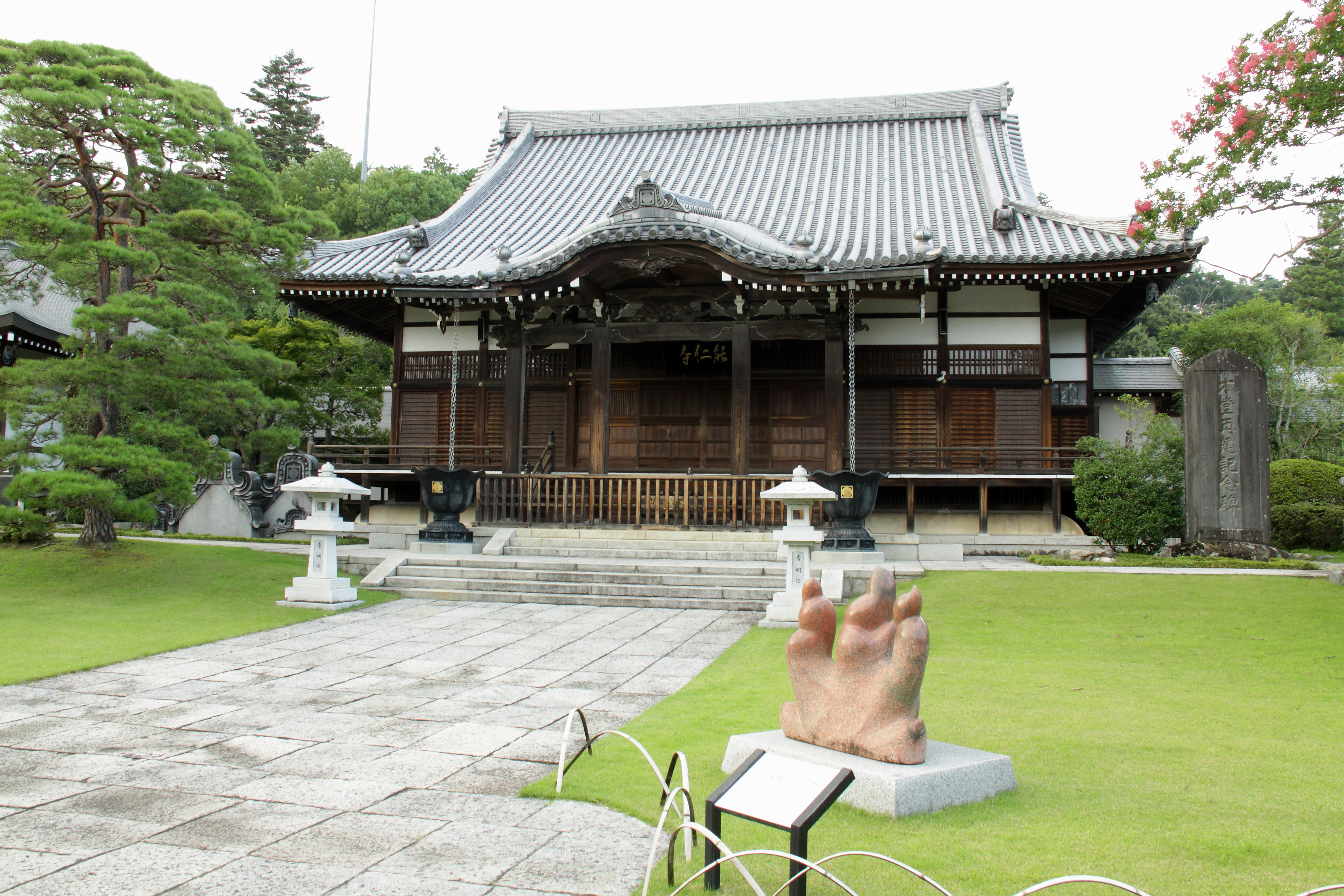 能仁寺(本堂)